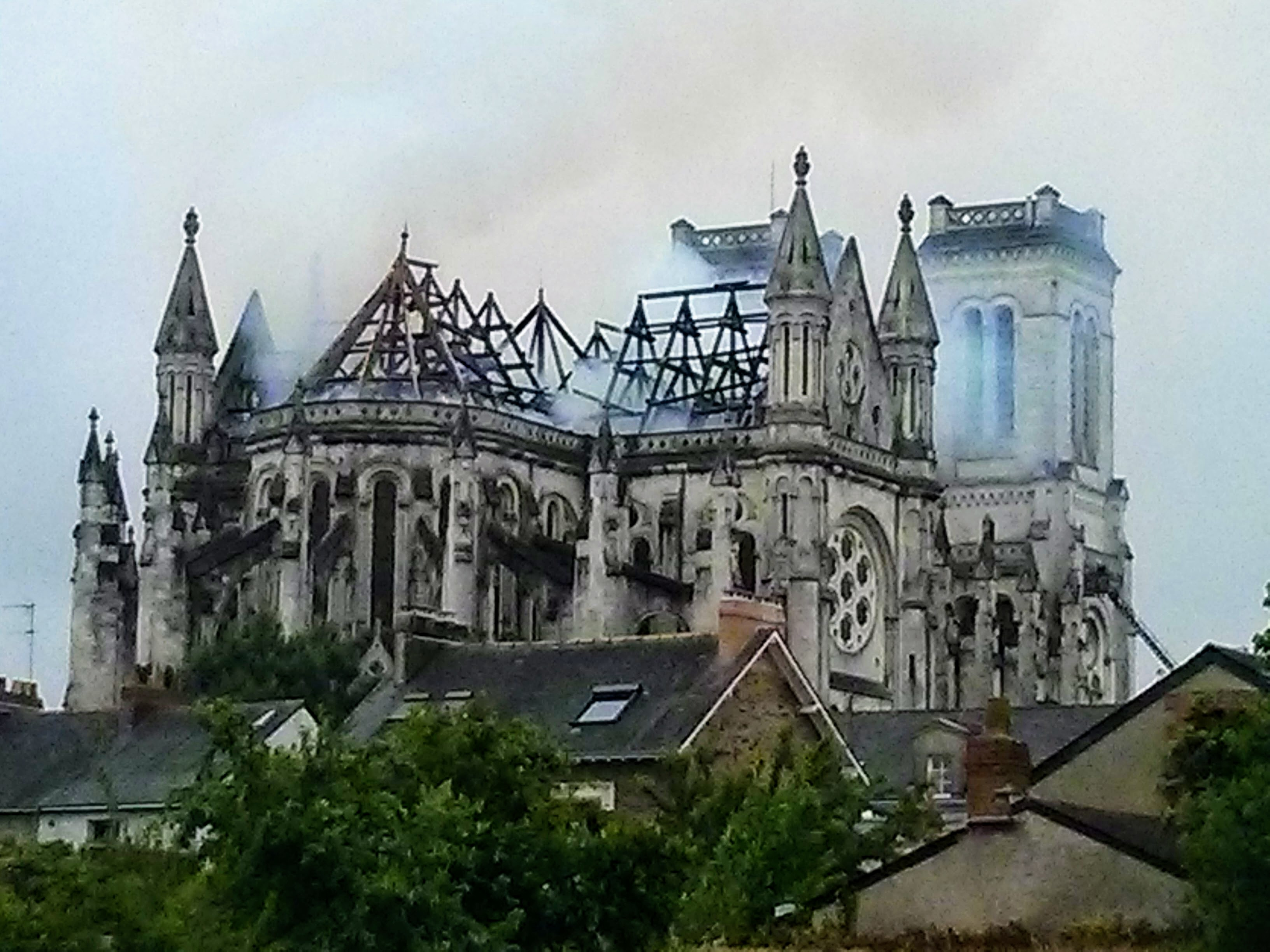 Incendie du 15 juin 2015 de la Basilique Saint-Donatien et Saint-Rogatien, charpente côté choeur